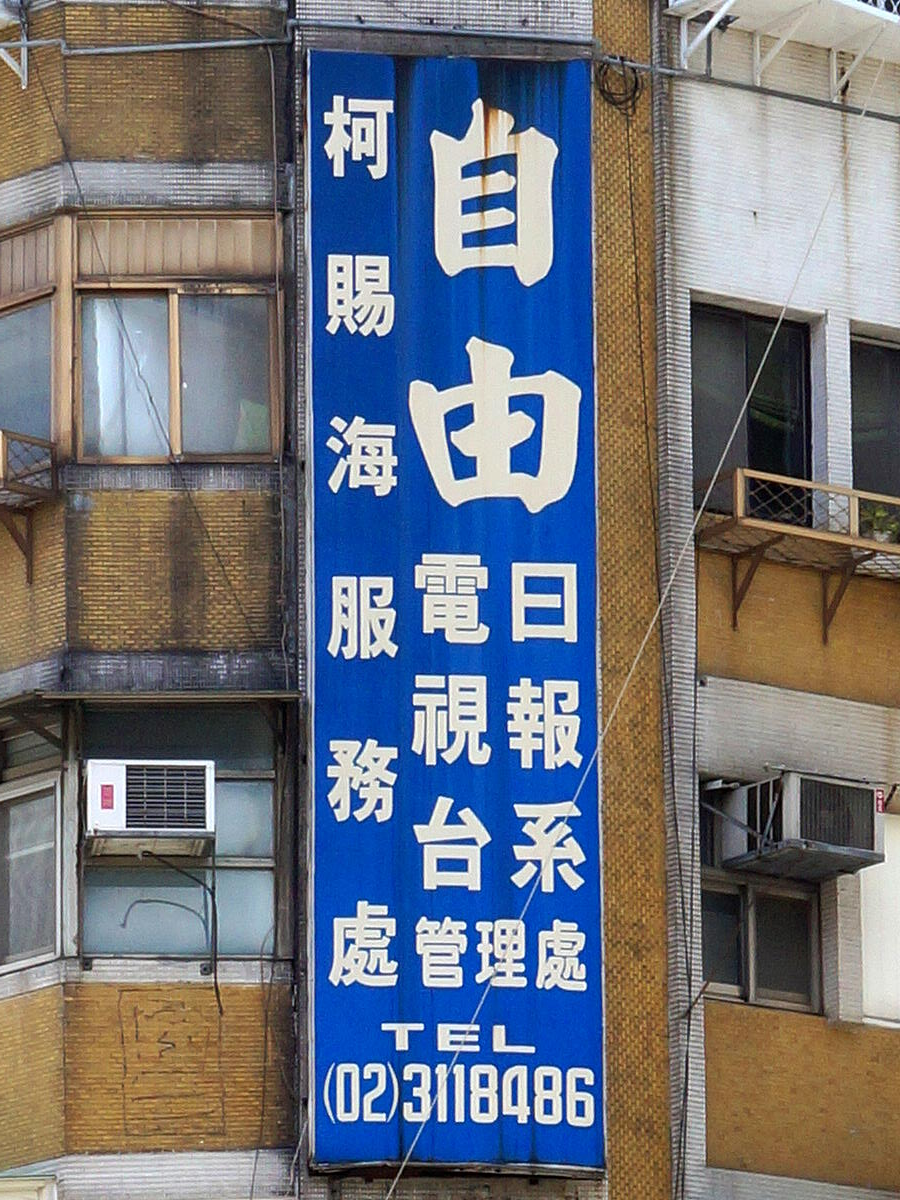 臺北市中山區中山北路三段55巷公寓外牆，柯賜海服務處招牌。